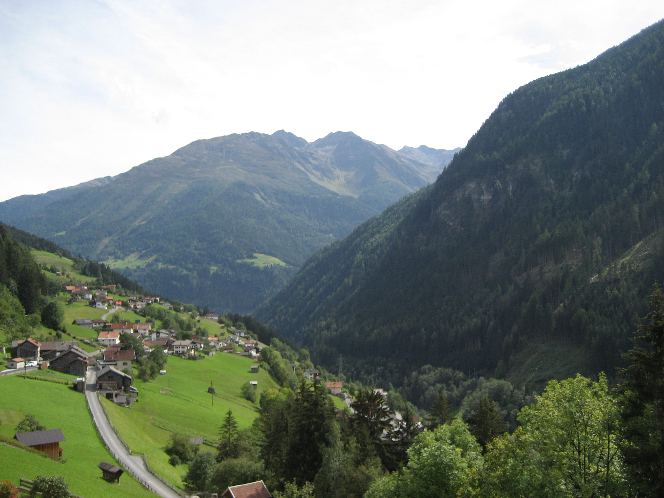 Blick Tal auswärts - Auf der rechten Seite ist die sogenannte "Schwarze Wand" zu sehen.